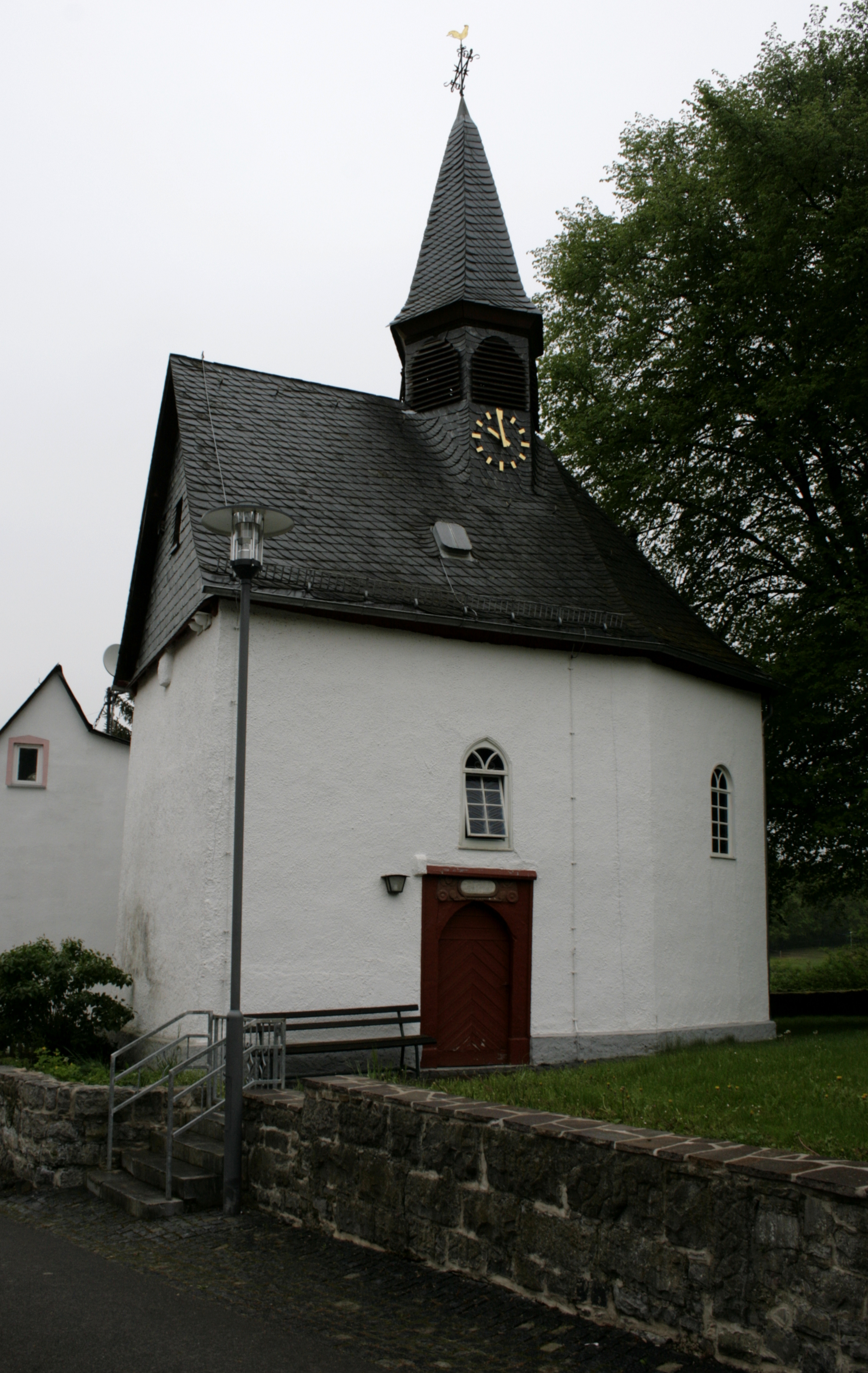 Kapelle in Runkel-Eschenau, Deutschland